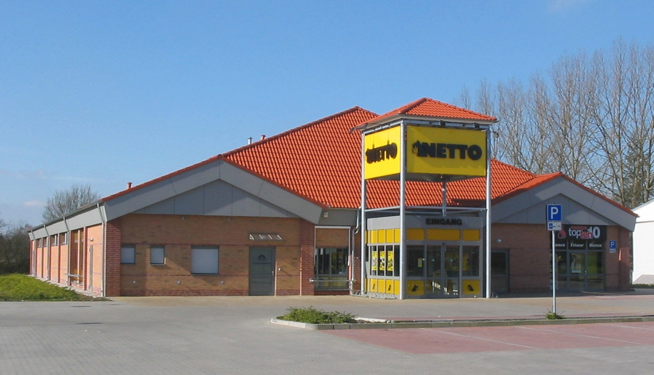 Netto-Filiale in Schwerin-Lankow